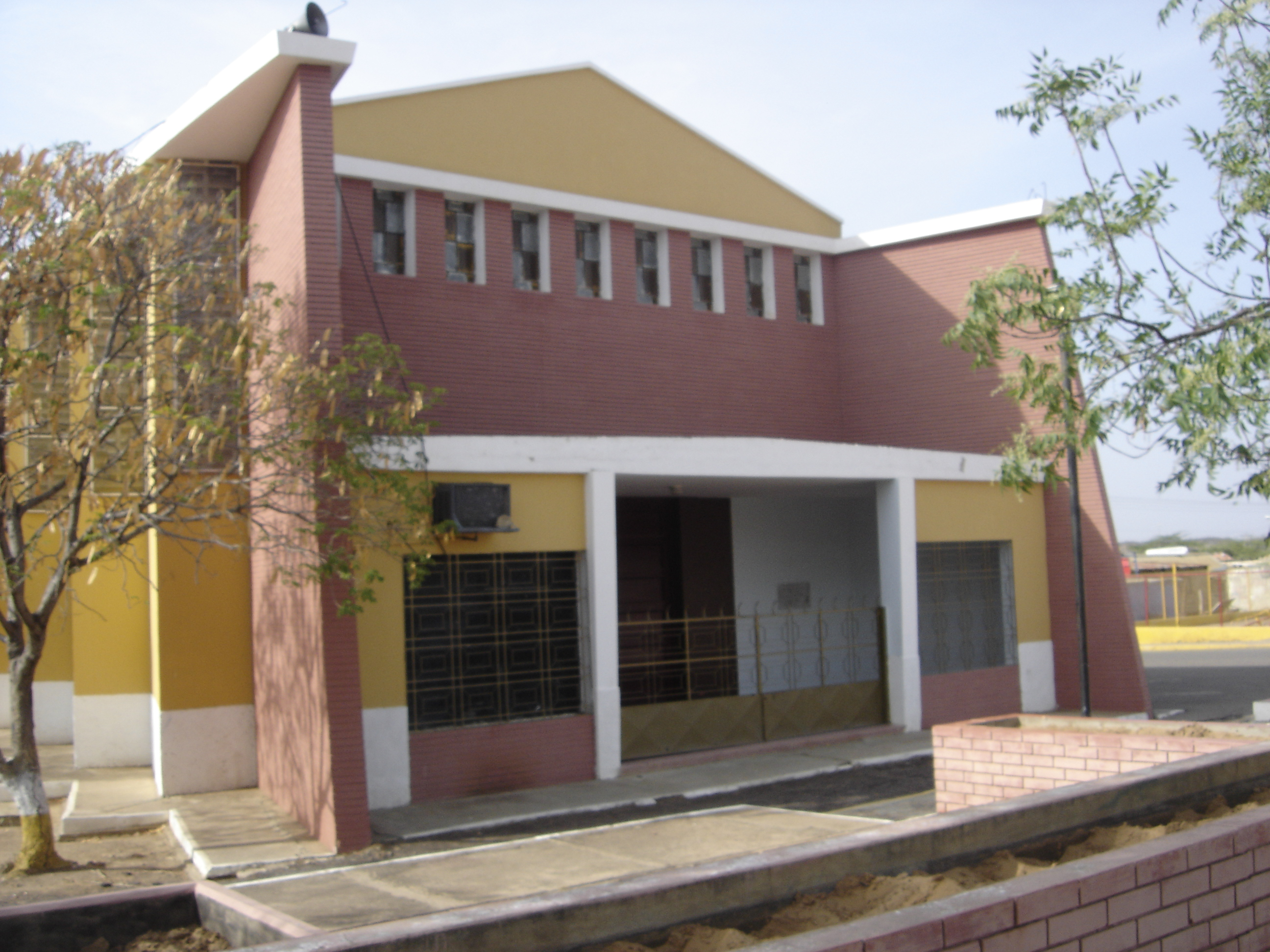 Iglesia de Urumaco, Estado Falcón, Venezuela.